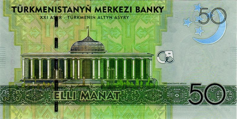 50 manat. Türkmenistan